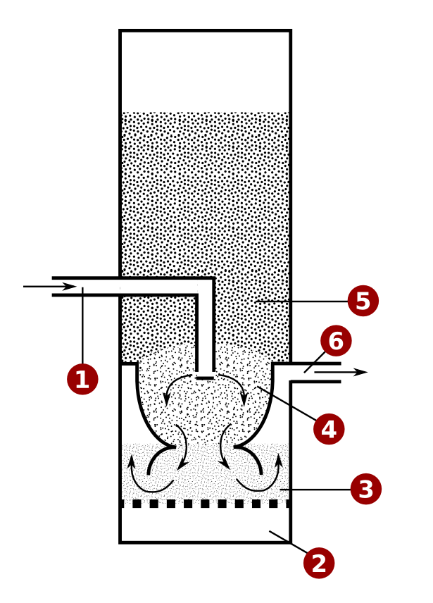 Inverzny generátor plynu pre výrobu plynu na pohon spaľovacieho motora z dreva.